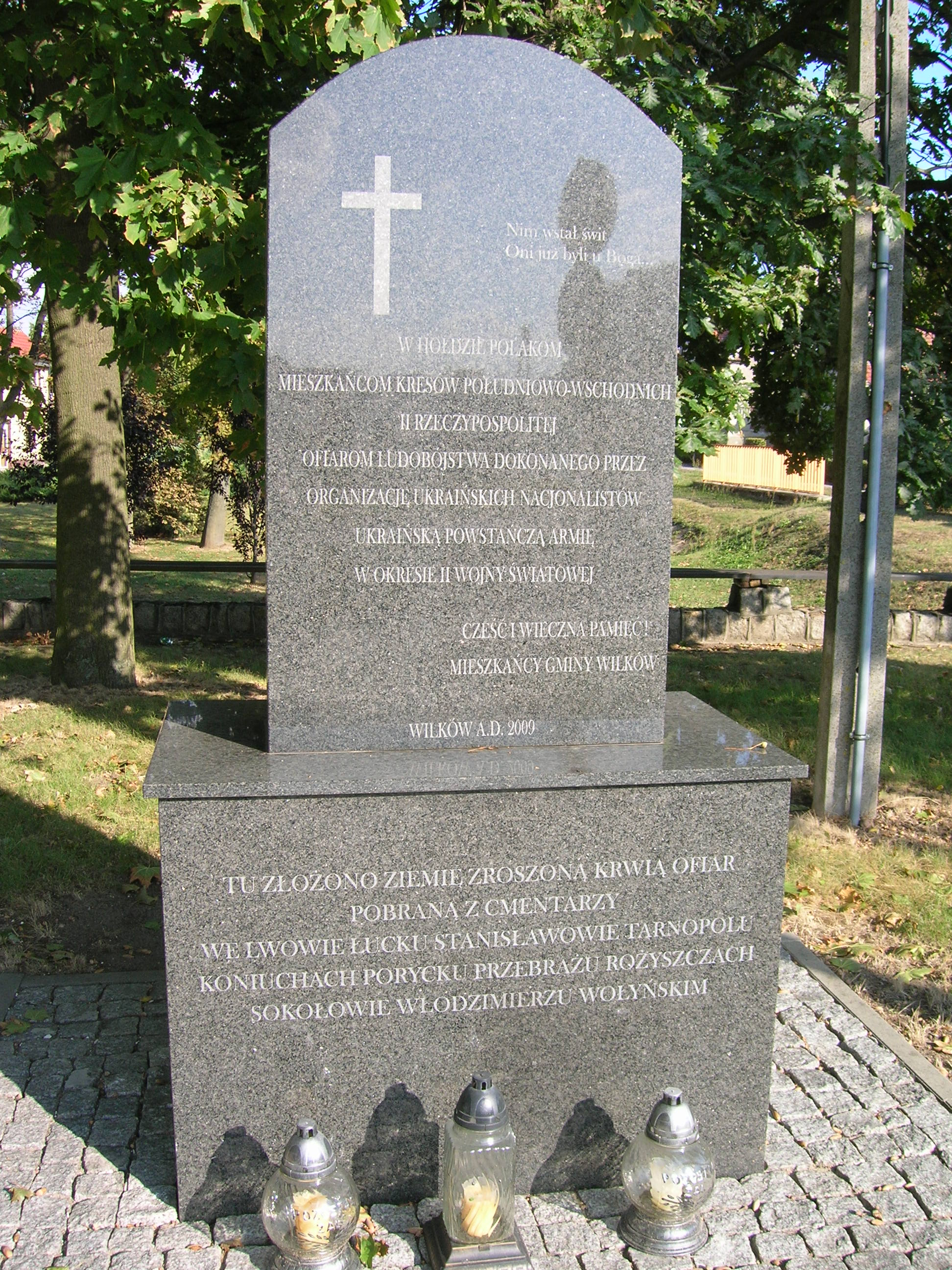 Pomnik w hołdzie ofiarom ludobójstwa dokonanego przez OUN i UPA, miejscowość Wilków